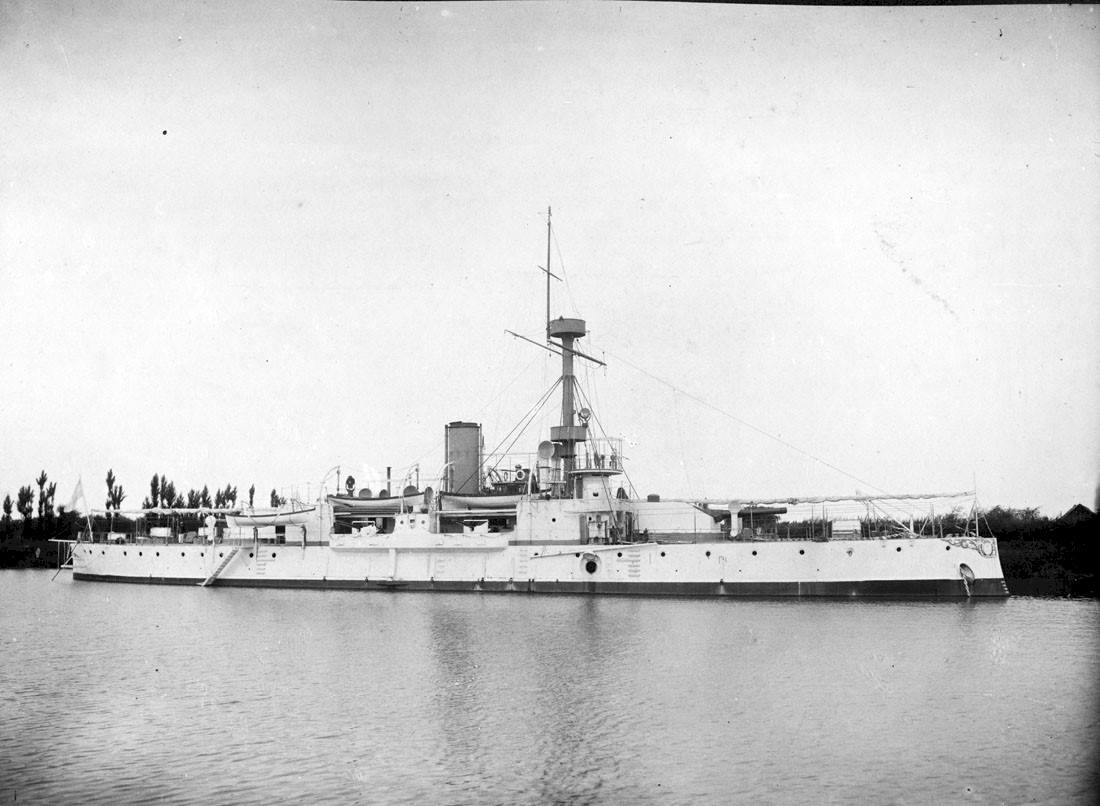 Fotografía del Acorazado de río ARA Libertad